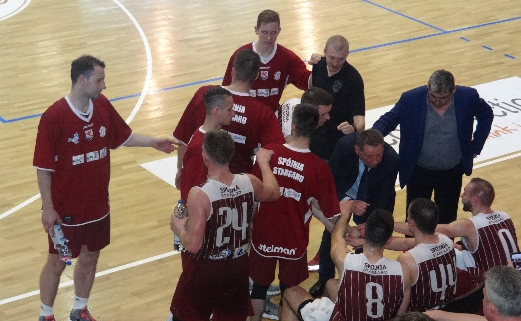 Spójnia Stargard (29.04.2018)